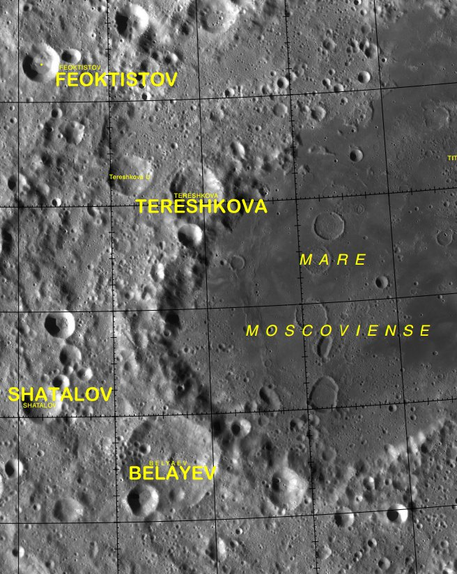 Cráter lunar Feoktistov. (Imagen LRO)